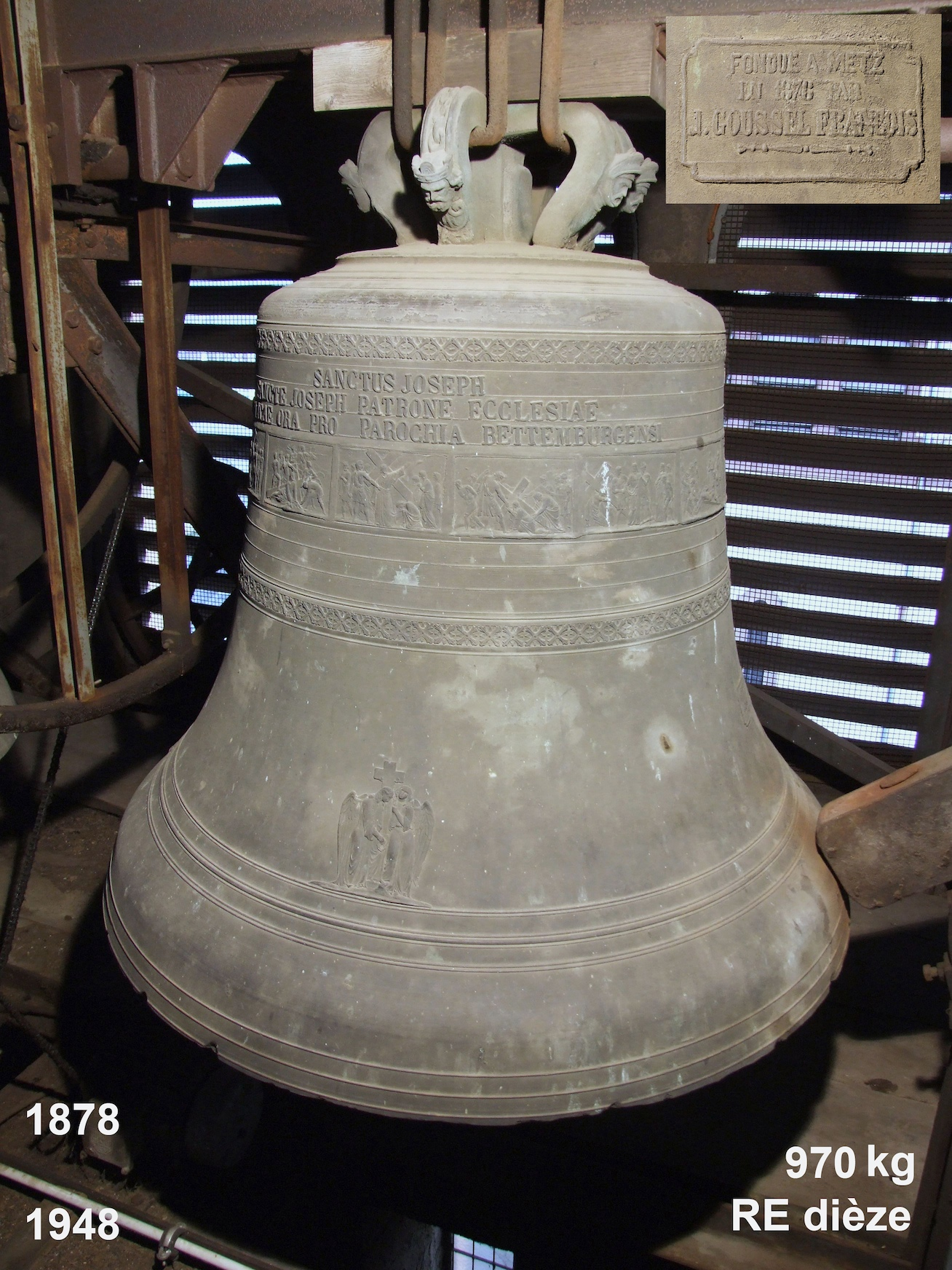 "Beetebuerger Klack" Waasserbëlleger Kierch.